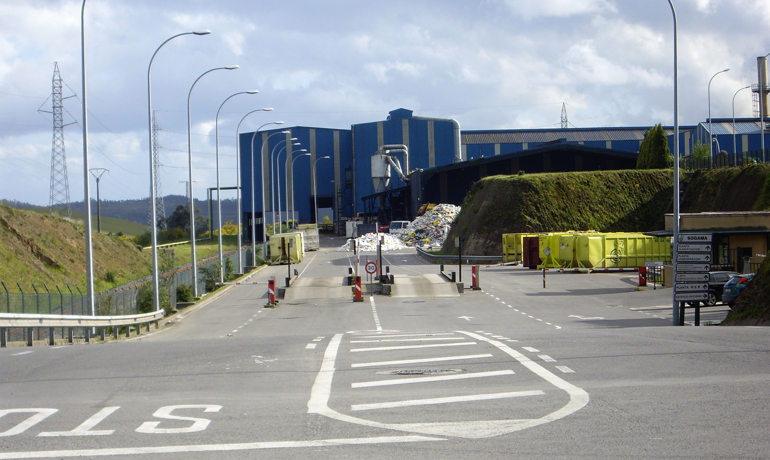 Porta de acceso a Sogama en Cerceda, A Coruña Galiza